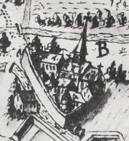 Dominikanerinnen-Kloster Liebenau bei Worms um 1620